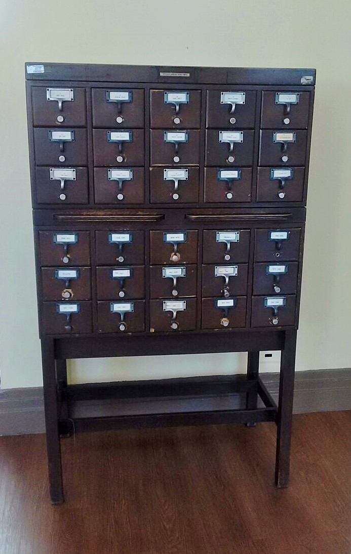 Ficheros bibliográficos de la Biblioteca Nacional ubicados en la Sala Daniel Samper Ortega